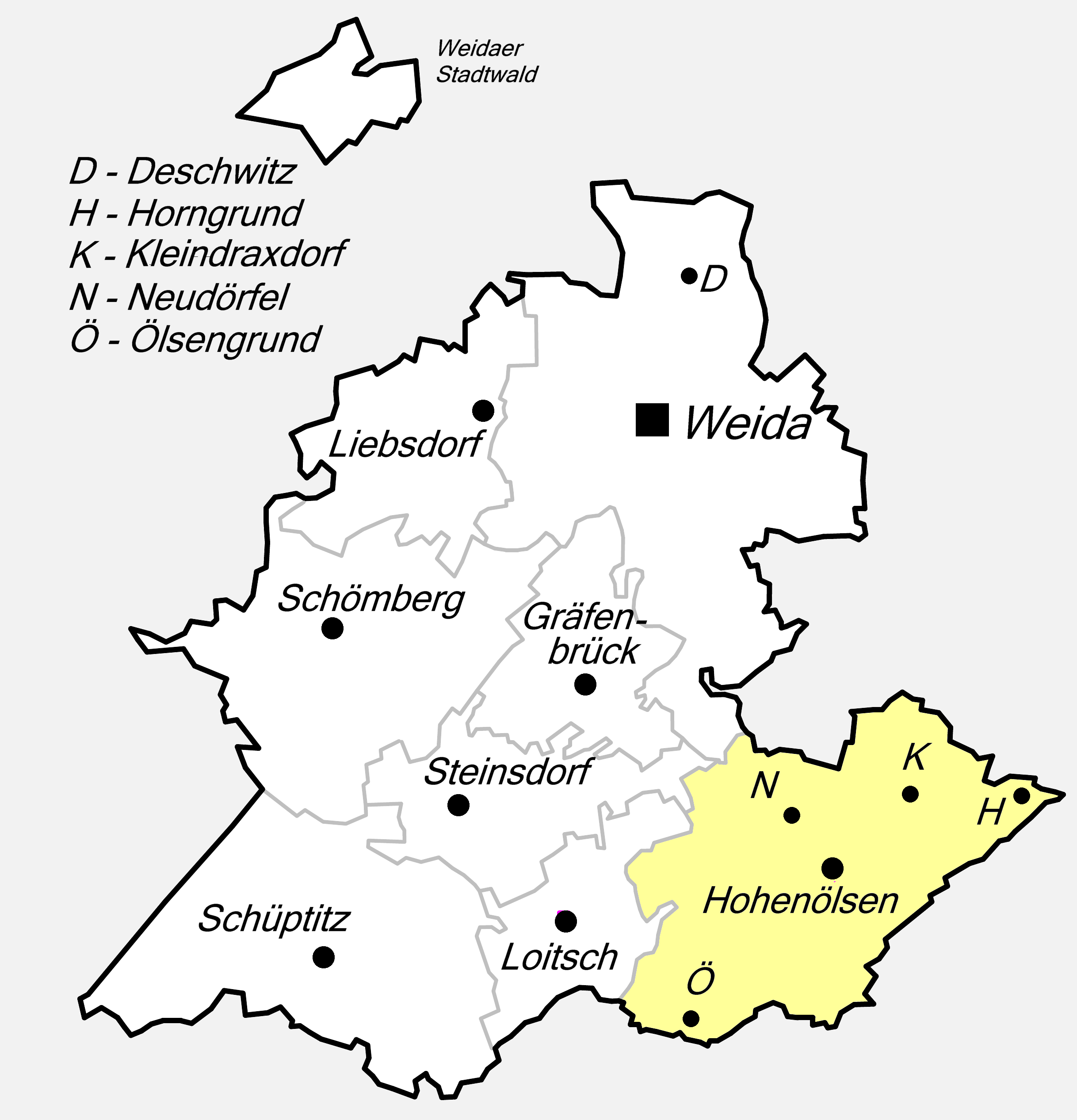 Lagekarte zum Weidaer Stadtteil Hohenölsen.